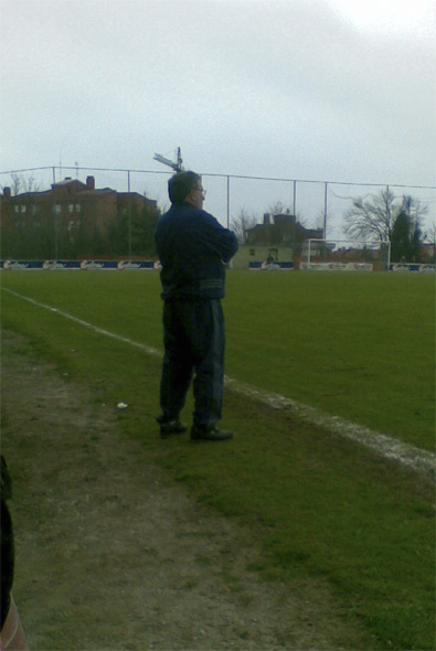 Rogelio García entrenando al Ceares en un Ceares-Unión Popular de Langreo el 14 de marzo de 2009.